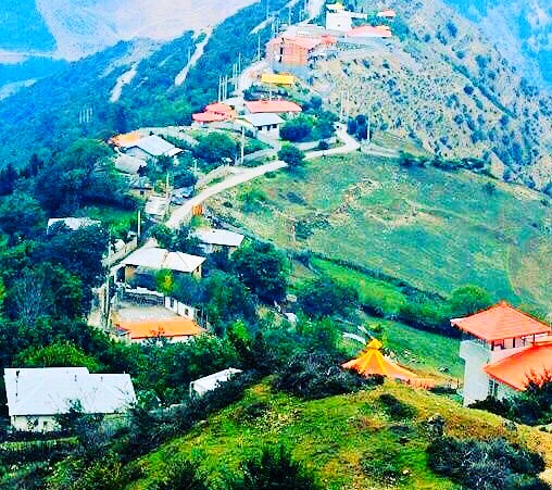 پرن زیبا